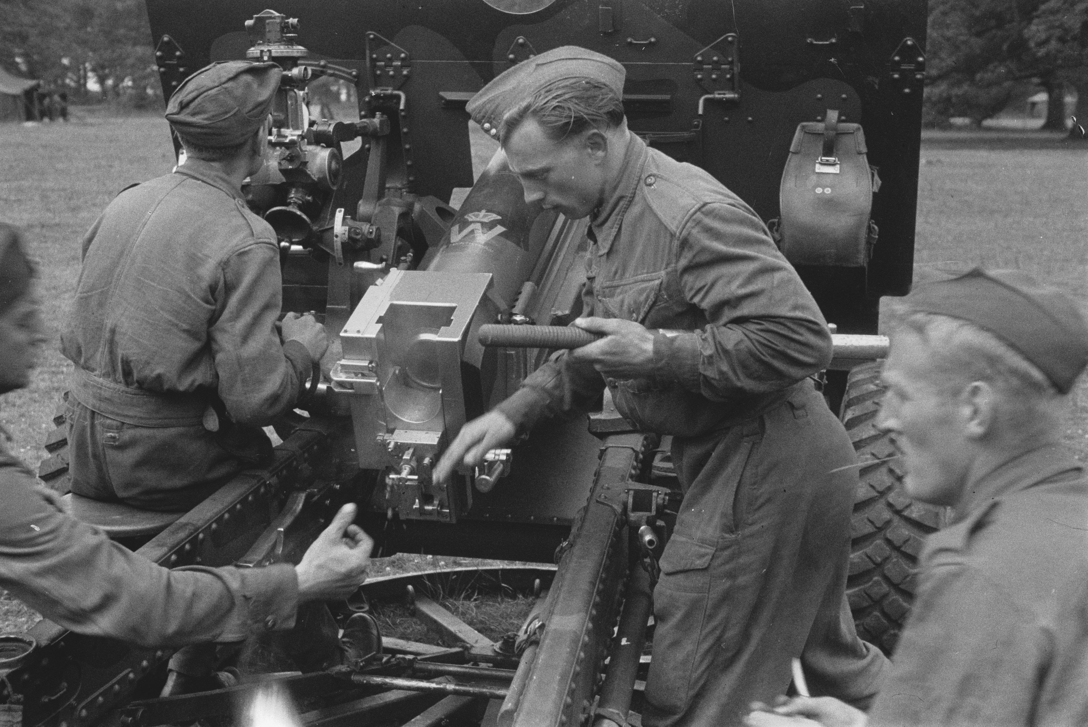 Collectie / Archief : Fotocollectie Anefo Reportage / Serie : [ onbekend ] Beschrijving : Netherlands Brigade Manoeuvres. The gun ready to fire [Oefeningen Prinses Irene Brigade. Een kanon gereed om te vuren] Datum : augustus 1943 Locatie : Groot-Brittannië Trefwoorden : leger, manoeuvres, soldaten, tweede wereldoorlog Fotograaf : Onbekend / Publiek Domein, [onbekend] Auteursrechthebbende : Nationaal Archief Materiaalsoort : Negatief (zwart/wit) Nummer archiefinventaris : bekijk toegang 2.24.01.05 Bestanddeelnummer : 934-9339